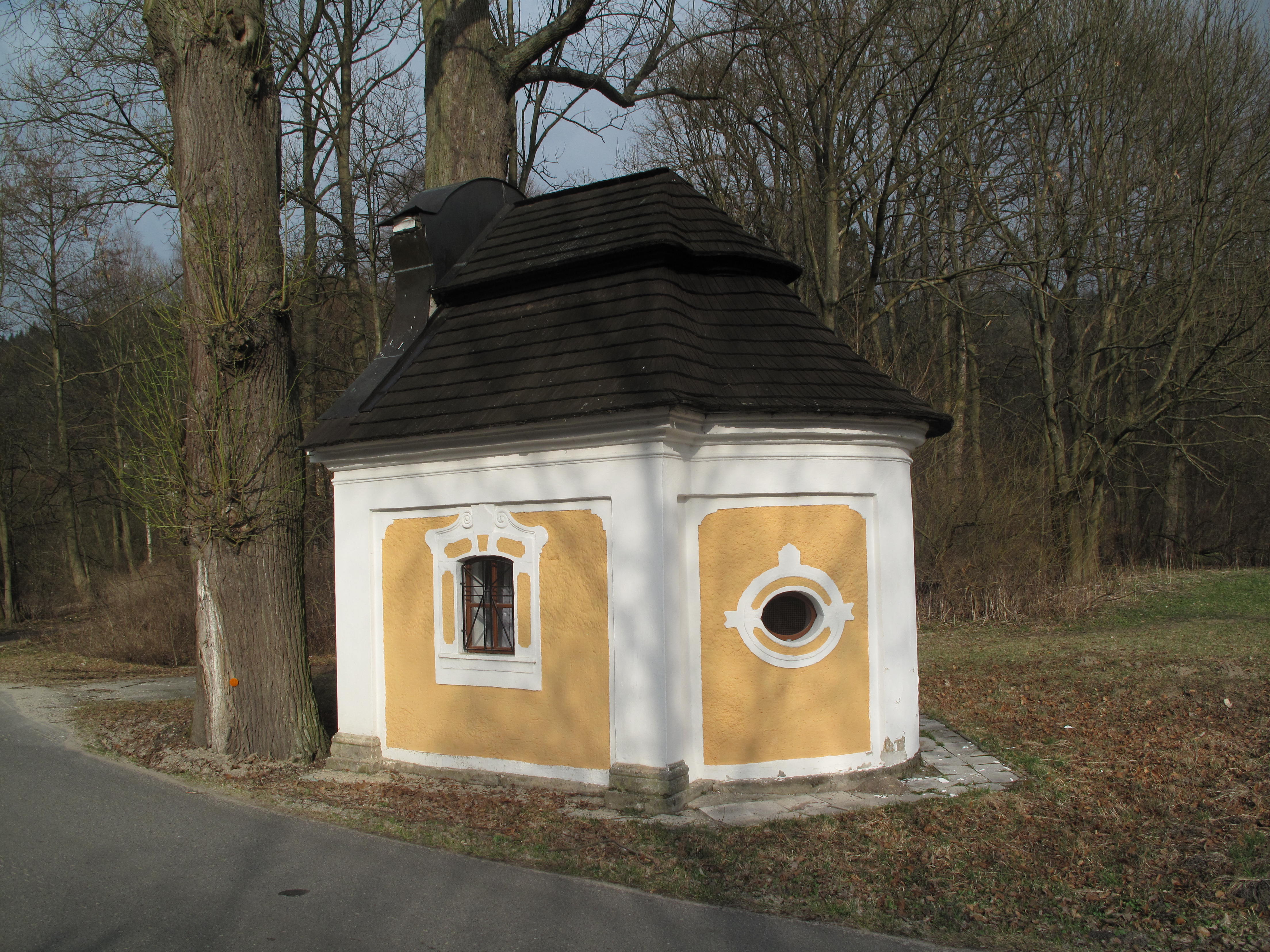 Kaple u Dědova, okres Náchod, Královéhradecký kraj